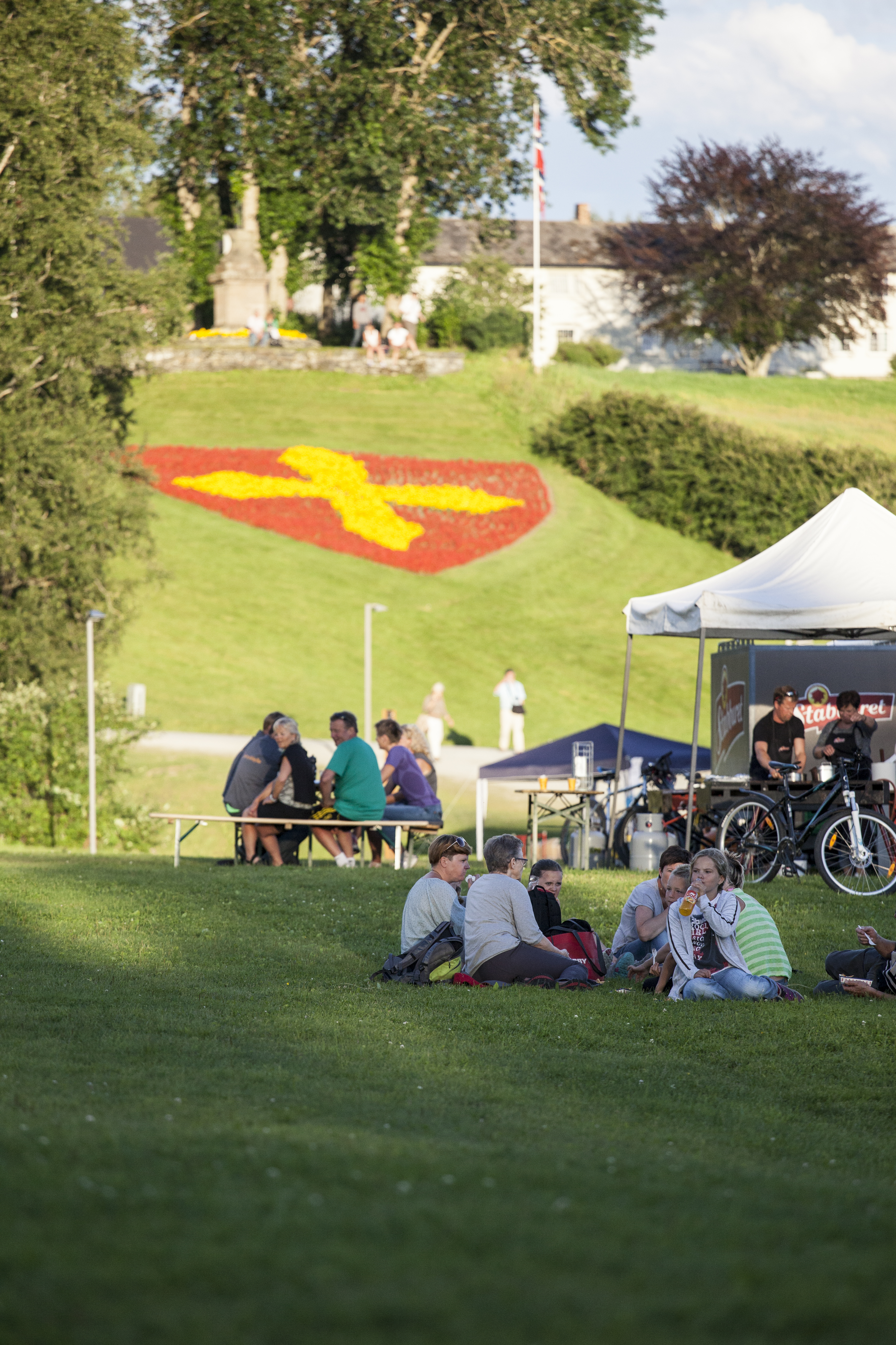 Festivalstemning foran blomsterkorset og Olavsstøtta på Stiklestad